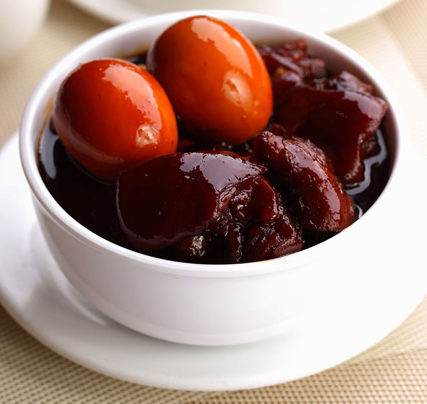 一碗豬腳薑